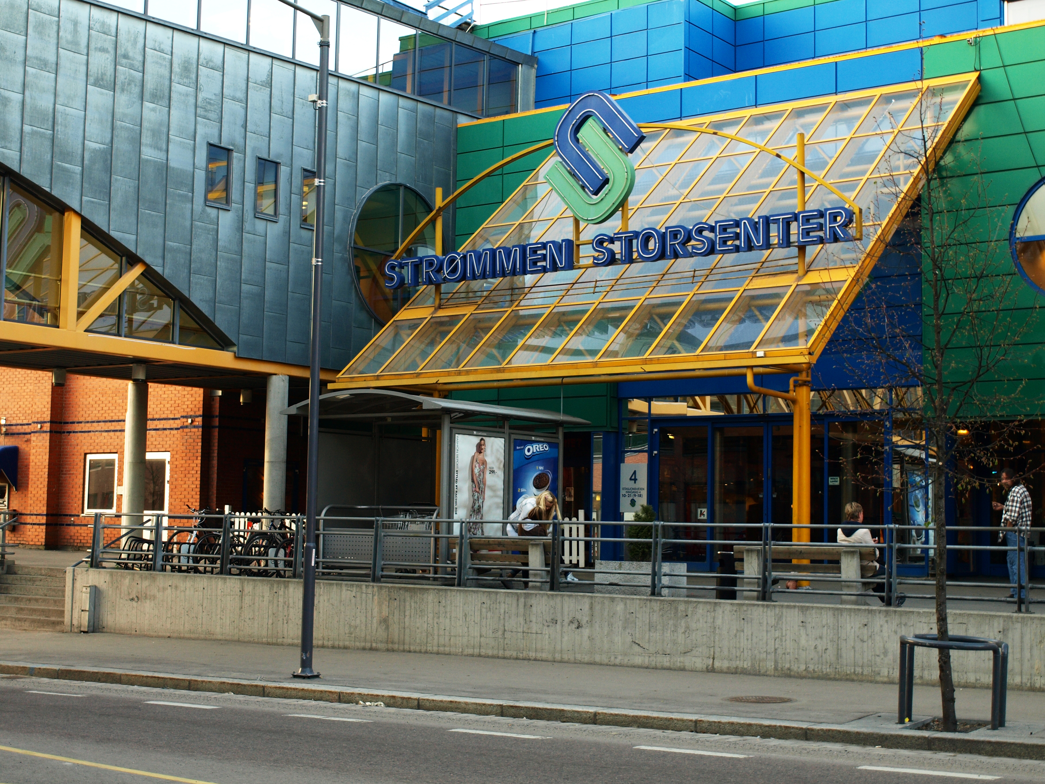 Strømmen Storsenter